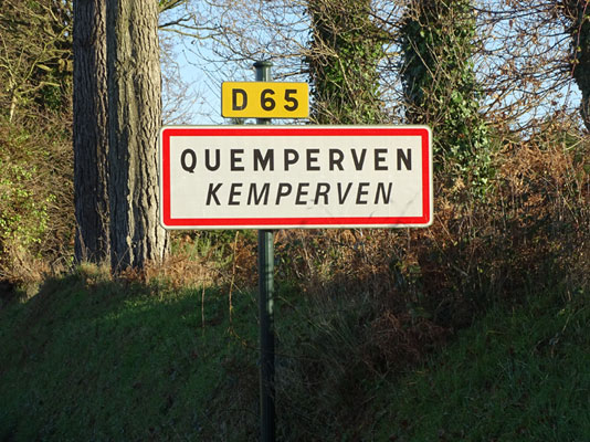 Kemperven. Pannell ar Gêr